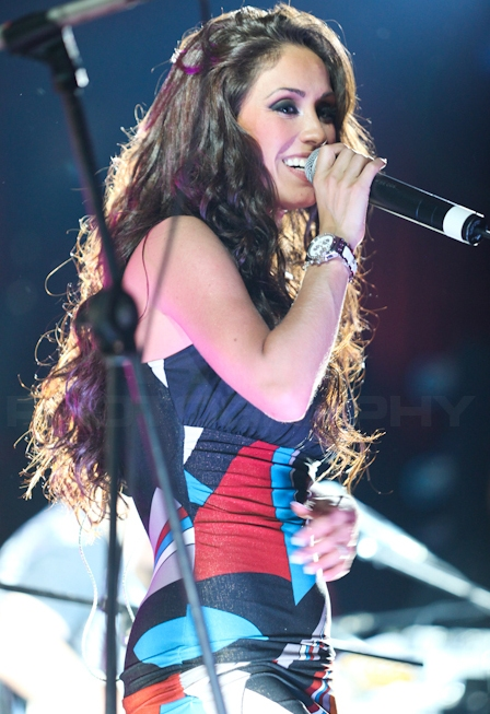 Anahí durante la Tocada Pulsar en Tiffanys, como parte de Mi Delirio World Tour, en Tijuana, México. Jueves 21 de octubre de 2010.